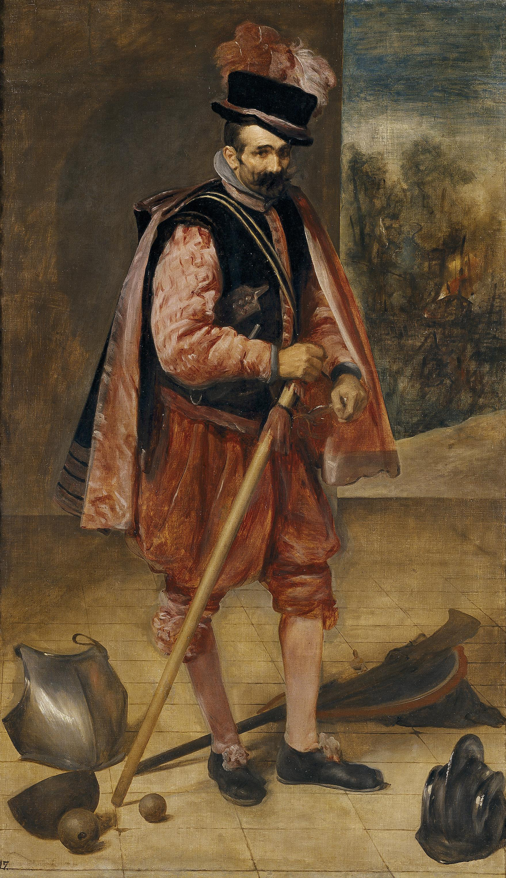 Retrato del bufón llamado Don Juan de Austria, que estuvo al servicio de la Corte española entre 1624 y 1654.